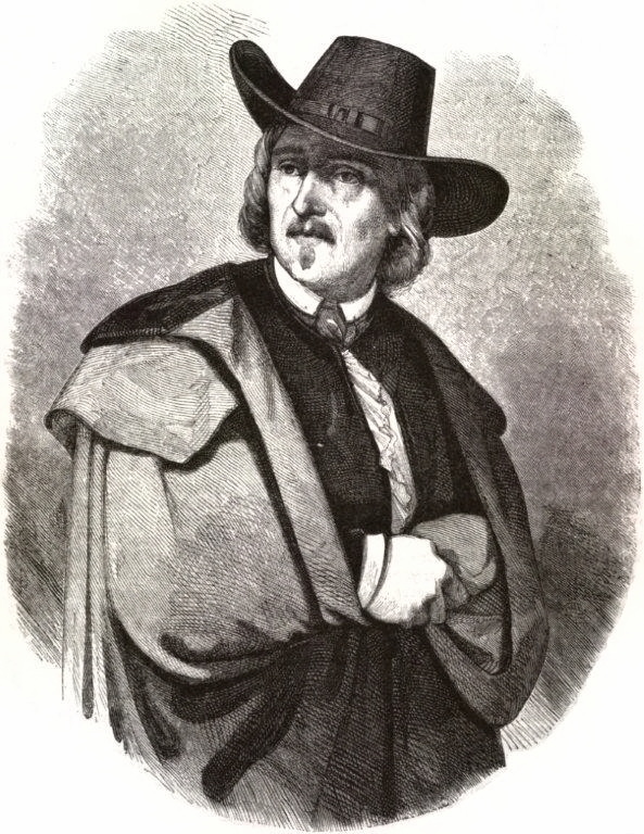 Jean Jacques Pradier, französisch-schweizerischer Bildhauer im 19. Jahrhundert.